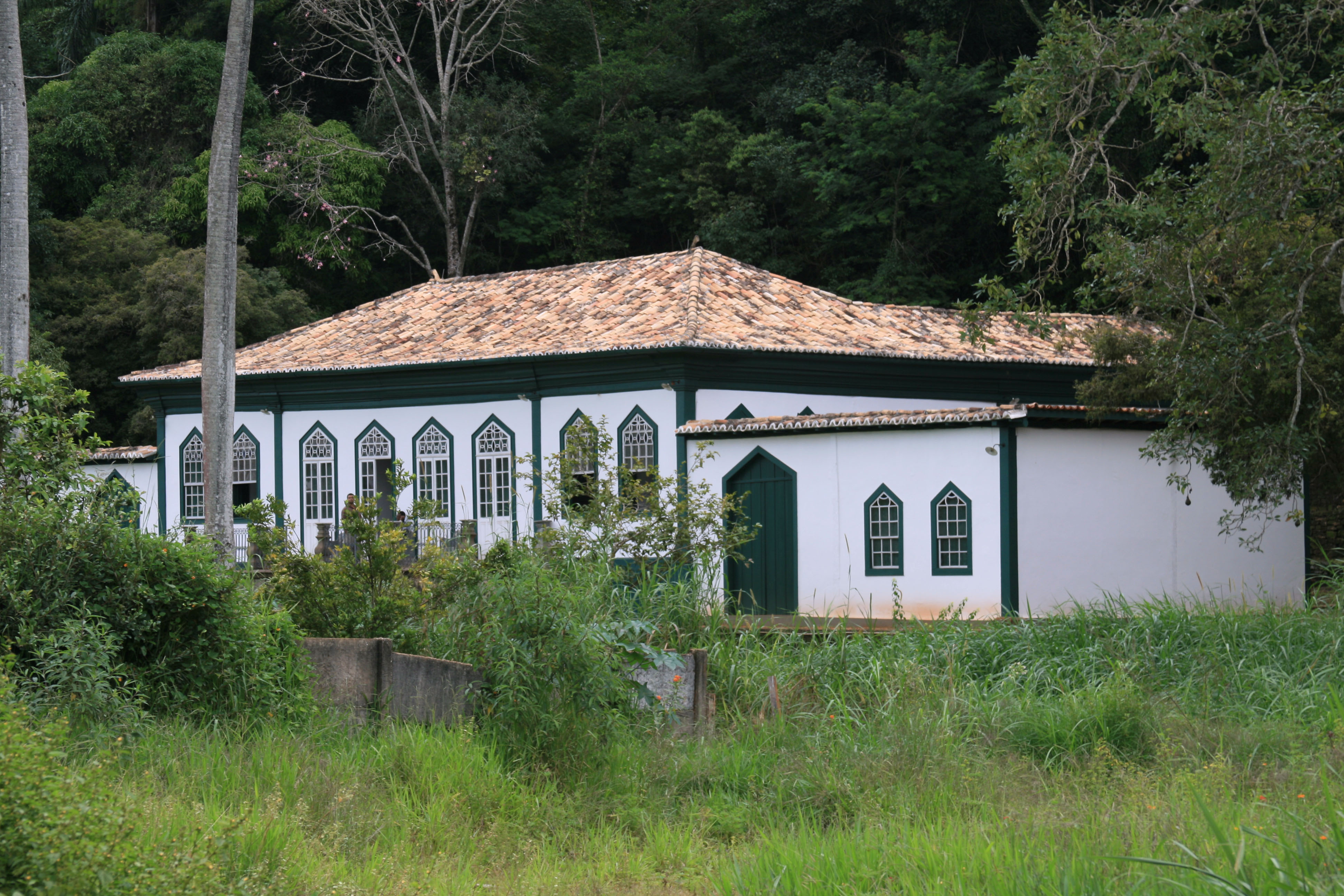 Chácara Barão do Serro - Obra da segunda metade do século XIX construída para residência da família de José Joaquim Ferreira Rabelo, o Barão do Serro.